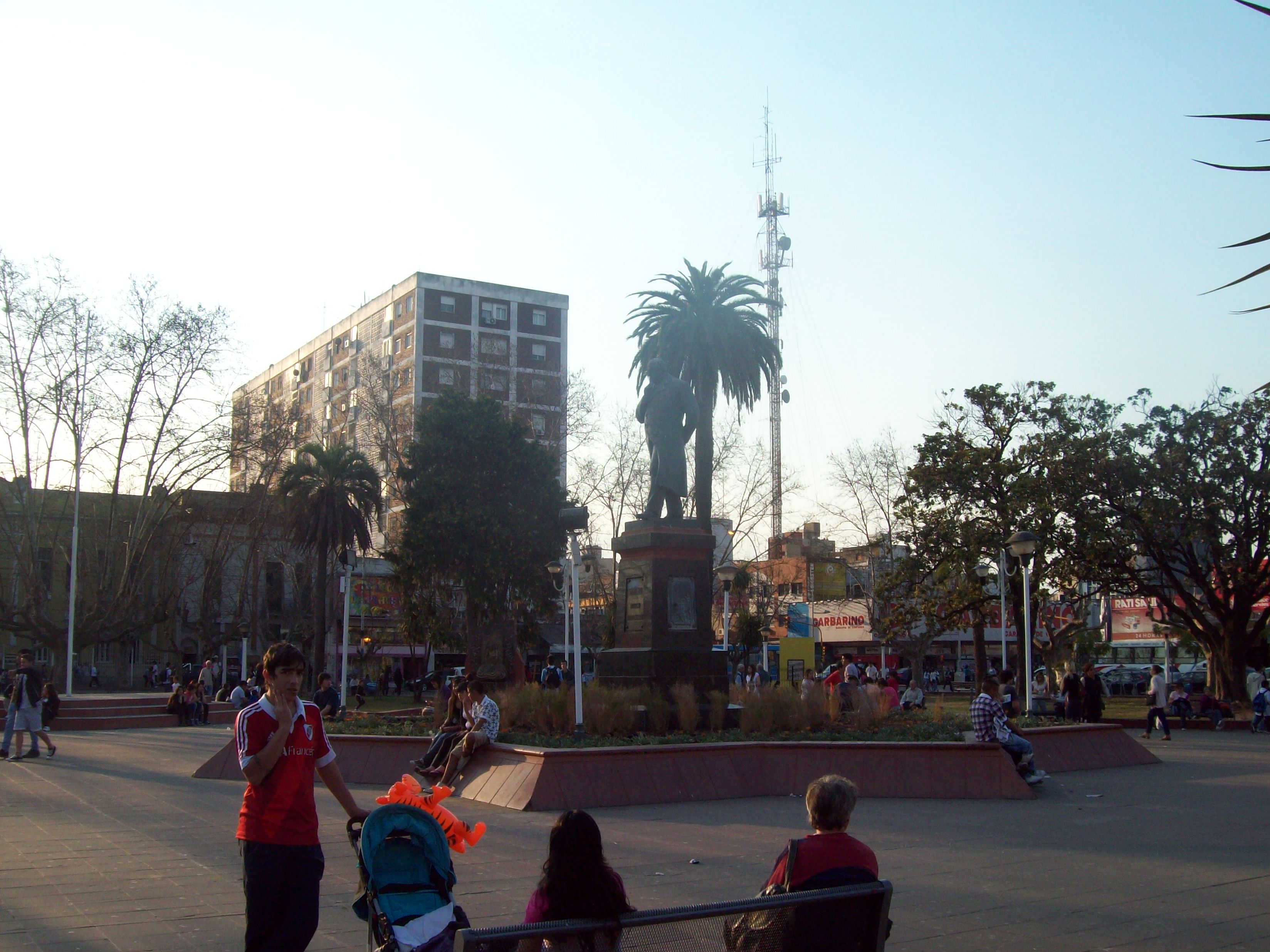 Plaza San Miguel, de la Localidad de San Miguel